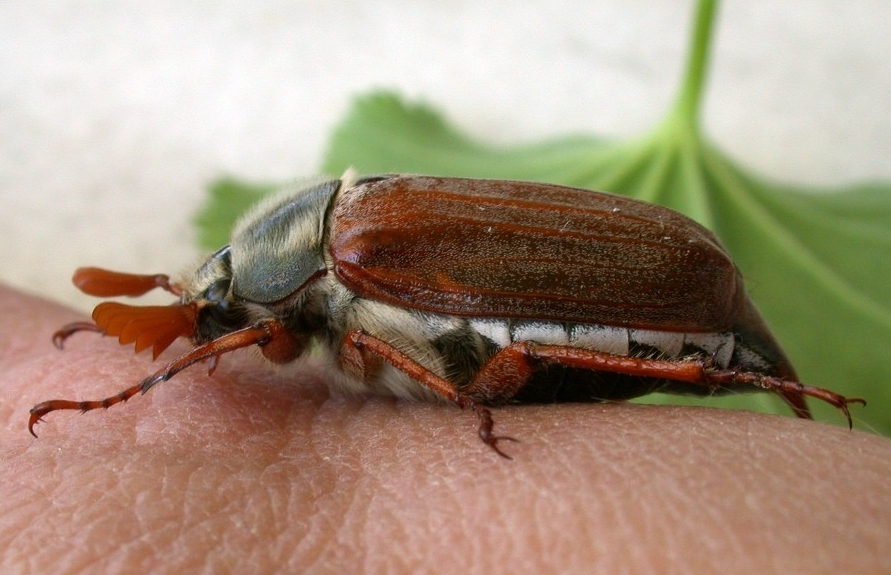 Maikäfer am 1. Mai